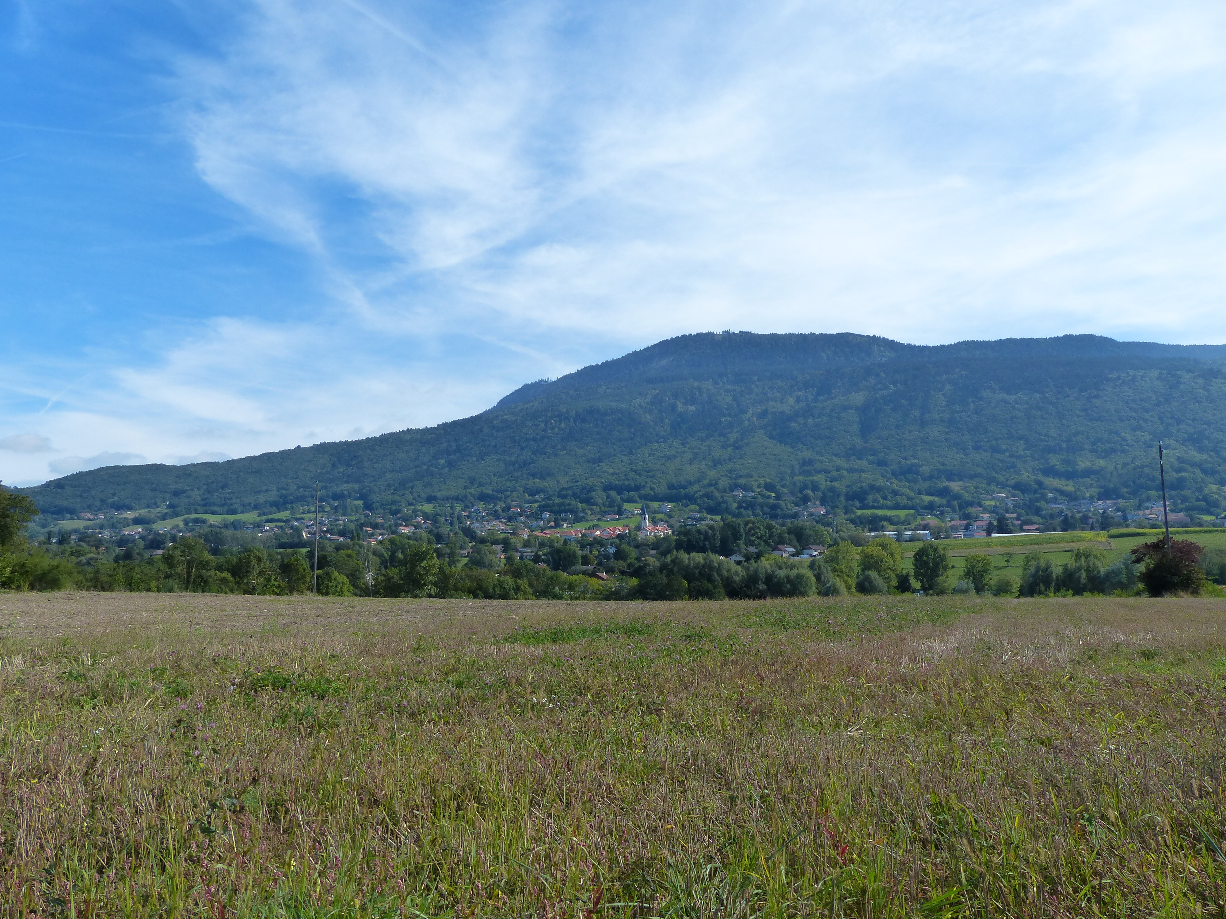 Vue du chef-lieu de Saint-Cergues et Les Voirons